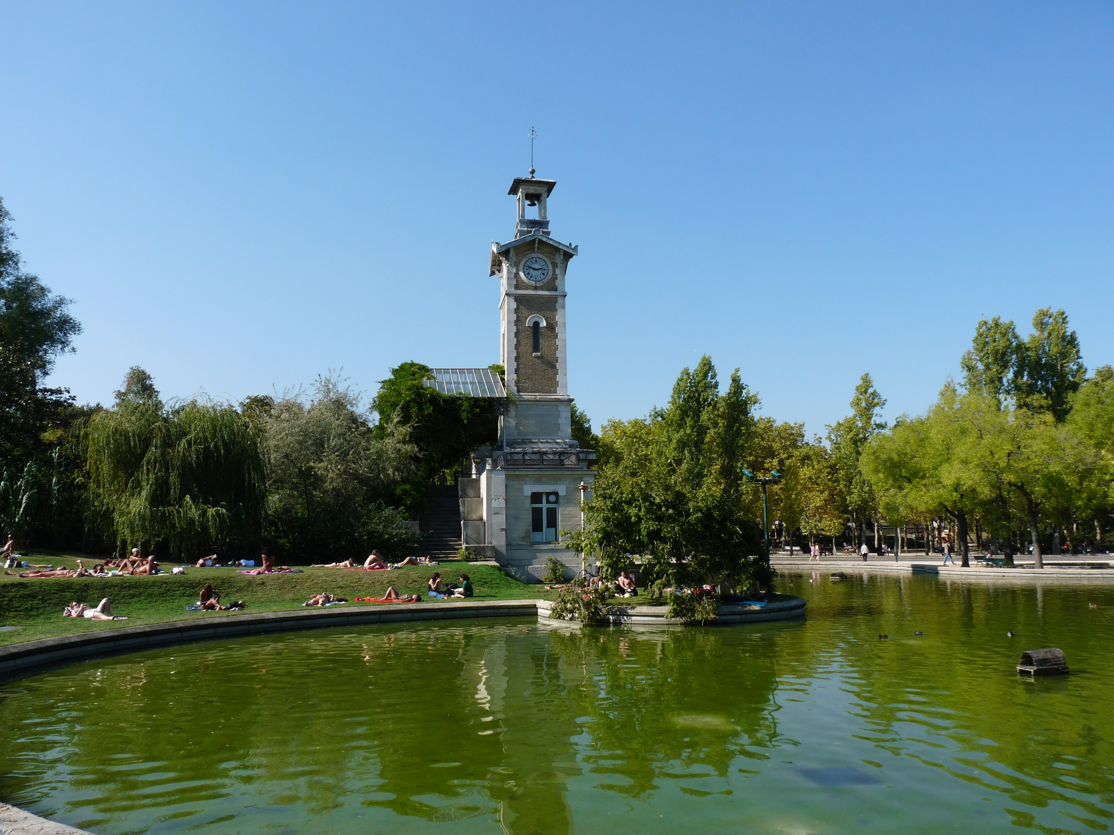 Le parc Georges Brassens à Paris